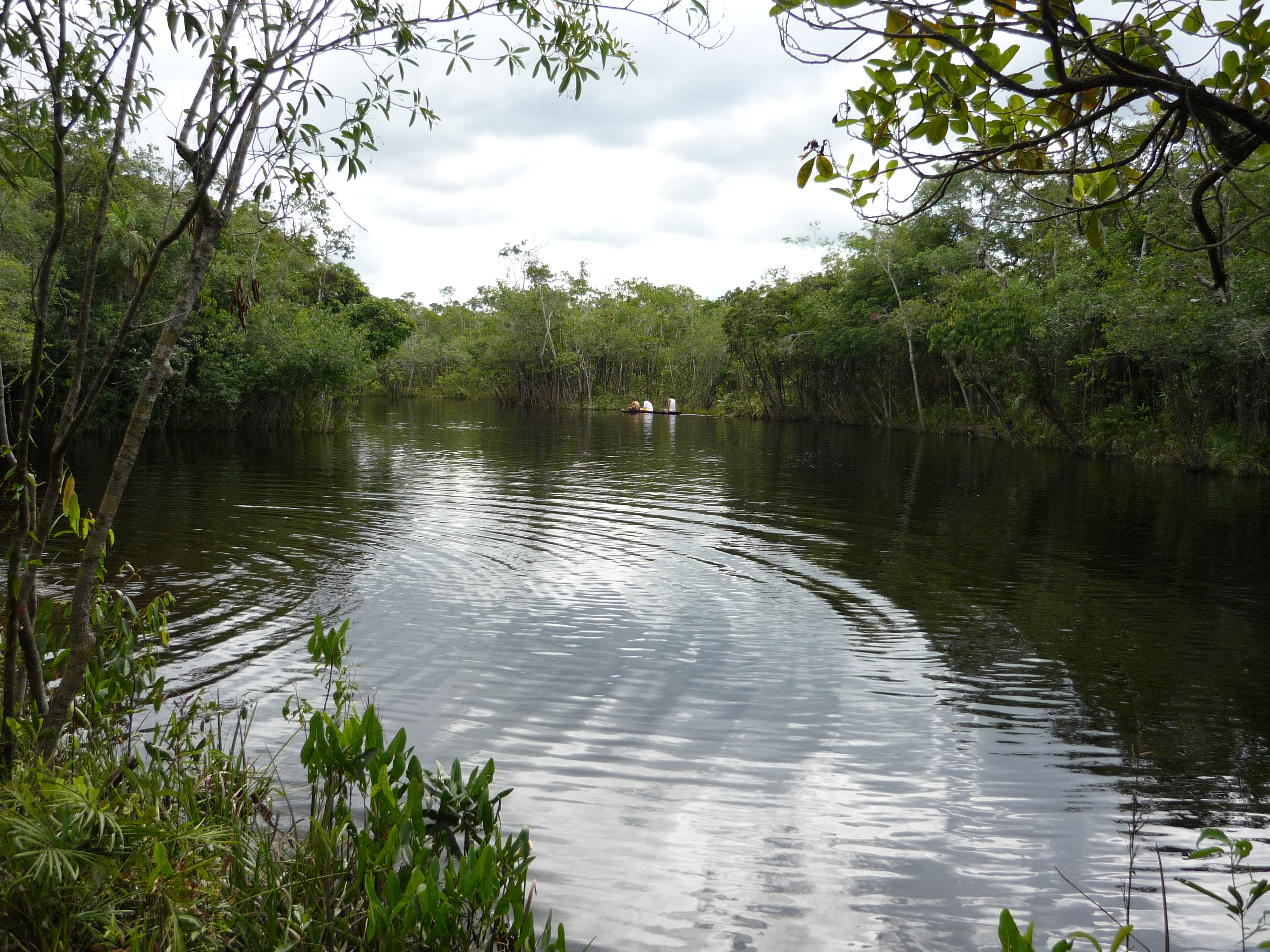 Sabanitas, Inírida - Guainía